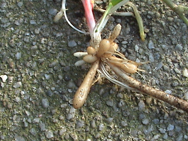 Ranunculus ficaria (Roots)